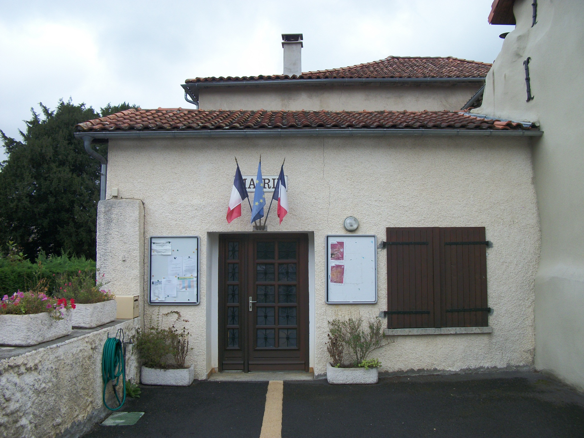 La mairie